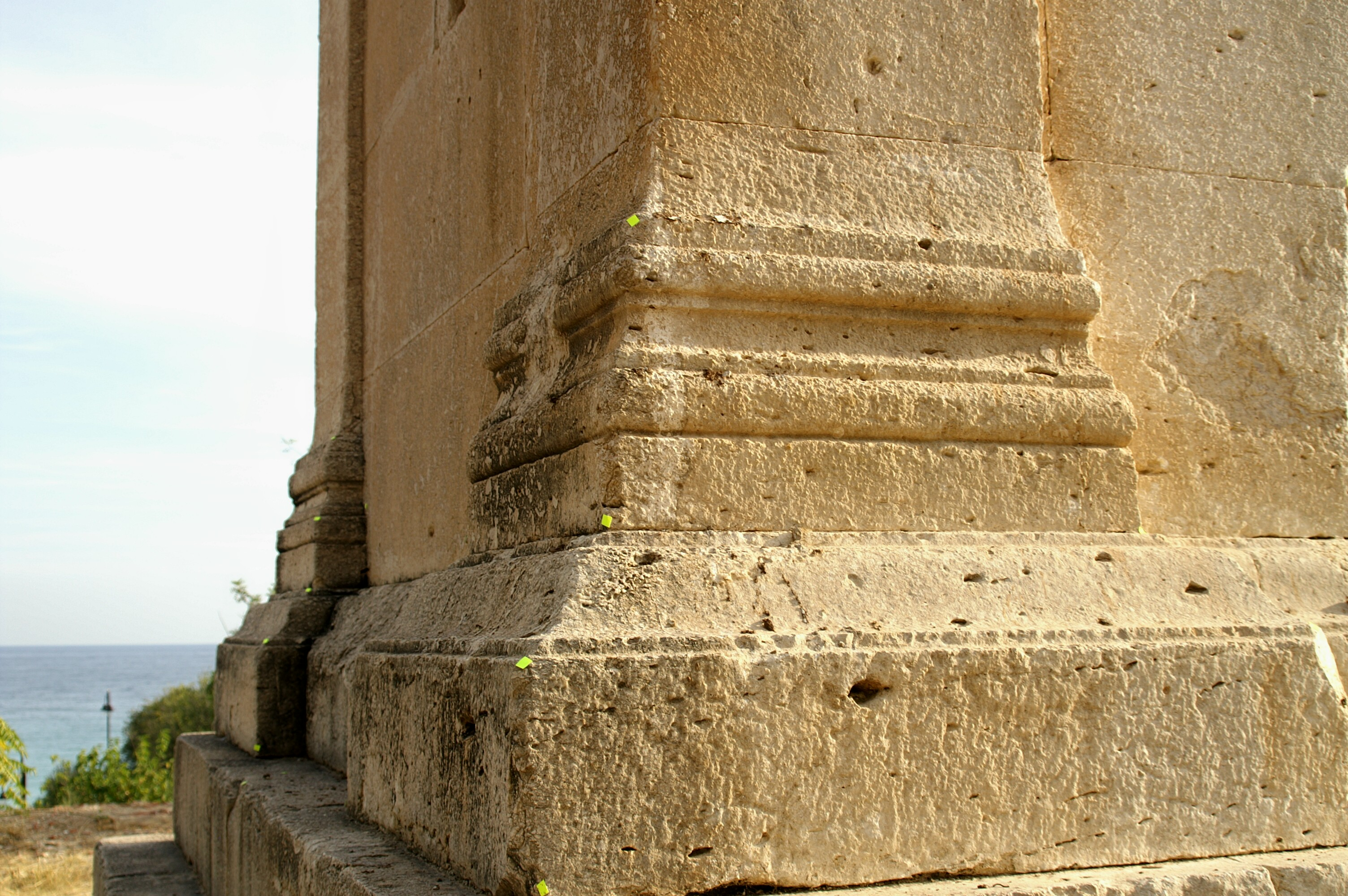 Detall de la base dels pilars de la torre d'Hèrcules, abans Torre de Sant Josep (la Vila Joiosa, la Marina Baixa, País Valencià)